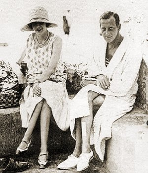 Dmitri Pavlovich com a esposa Audrey Emery